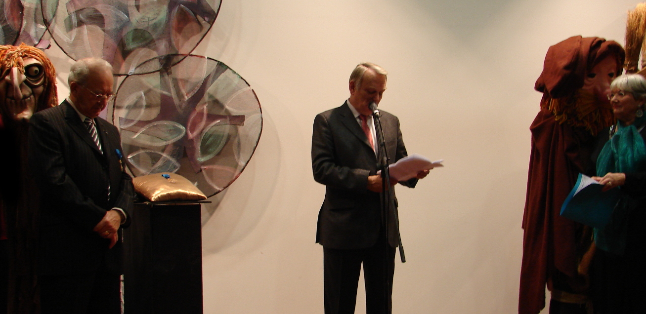 Le 08 décembre 2008 à l'espace Cosmopolis lors de l'exposition 1938-2008, 70 ans de marionnettes à Nantes, remise de la médaille de l'Ordre national du Mérite à Monique Créteur (à droite) en présence notamment de Jean Amyot d'Inville de l'académie littéraire de Bretagne & des Pays de la Loire, du député-maire Jean-Marc Ayrault (au centre) par le président départemental de l'ordre national du mérite M. Rocheteau (à gauche). Cliché photographique couleur collection personnelle de Monique Créteur.